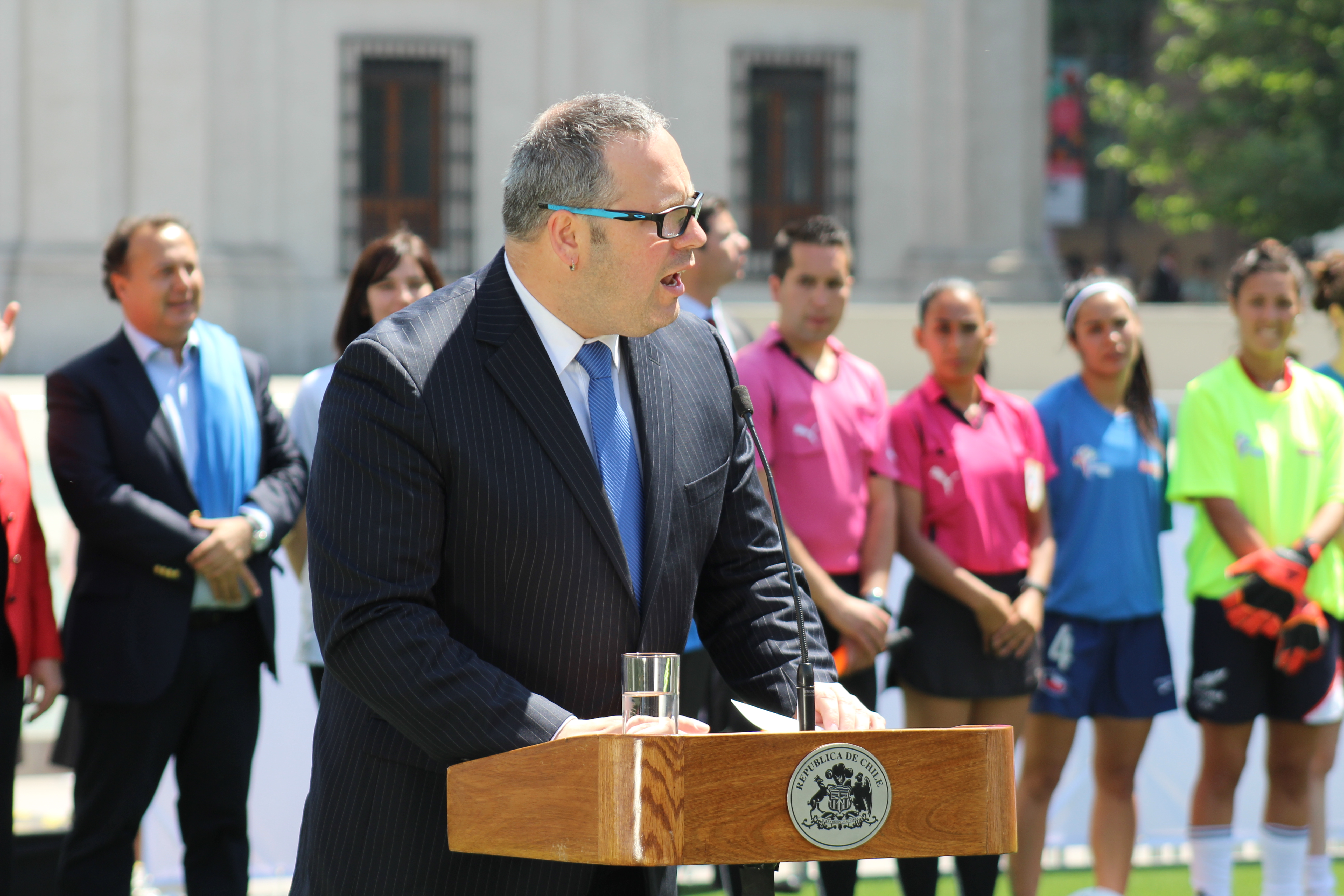 Director Sociocultural de la Presidencia, Sebastián Dávalos